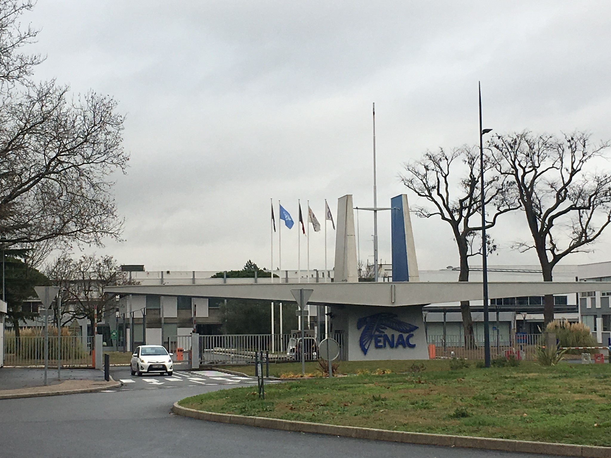 Entrée du campus toulousain de l’École nationale de l’aviation civile (ENAC)